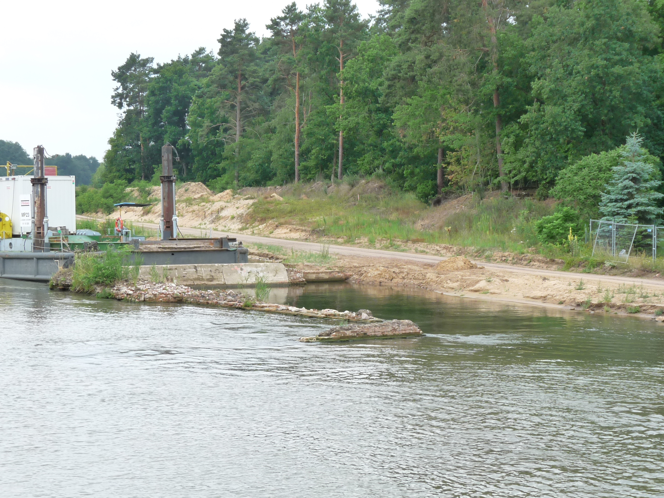 Der Ihlekanal wurde im Anschluss an eine Erweiterung des Plauer Kanals in den Jahren 1865 bis 1872 erbaut. Dieser verband den Plauer Kanal 1,5 Kilometer nördlich von Bergzow mit Burg und mündete einige Kilometer nördlich von Magdeburg mit einer Schleuse bei Niegripp in die Elbe ein. Bei den Bauarbeiten zur Erweiterung des Elbe-Havel-Kanal wurden Mauerreste der ehemaligen Schleuse Ihleburg freigelegt.